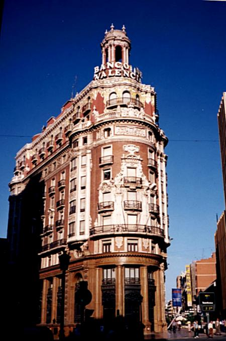 Valencia Banco 巴倫西亞